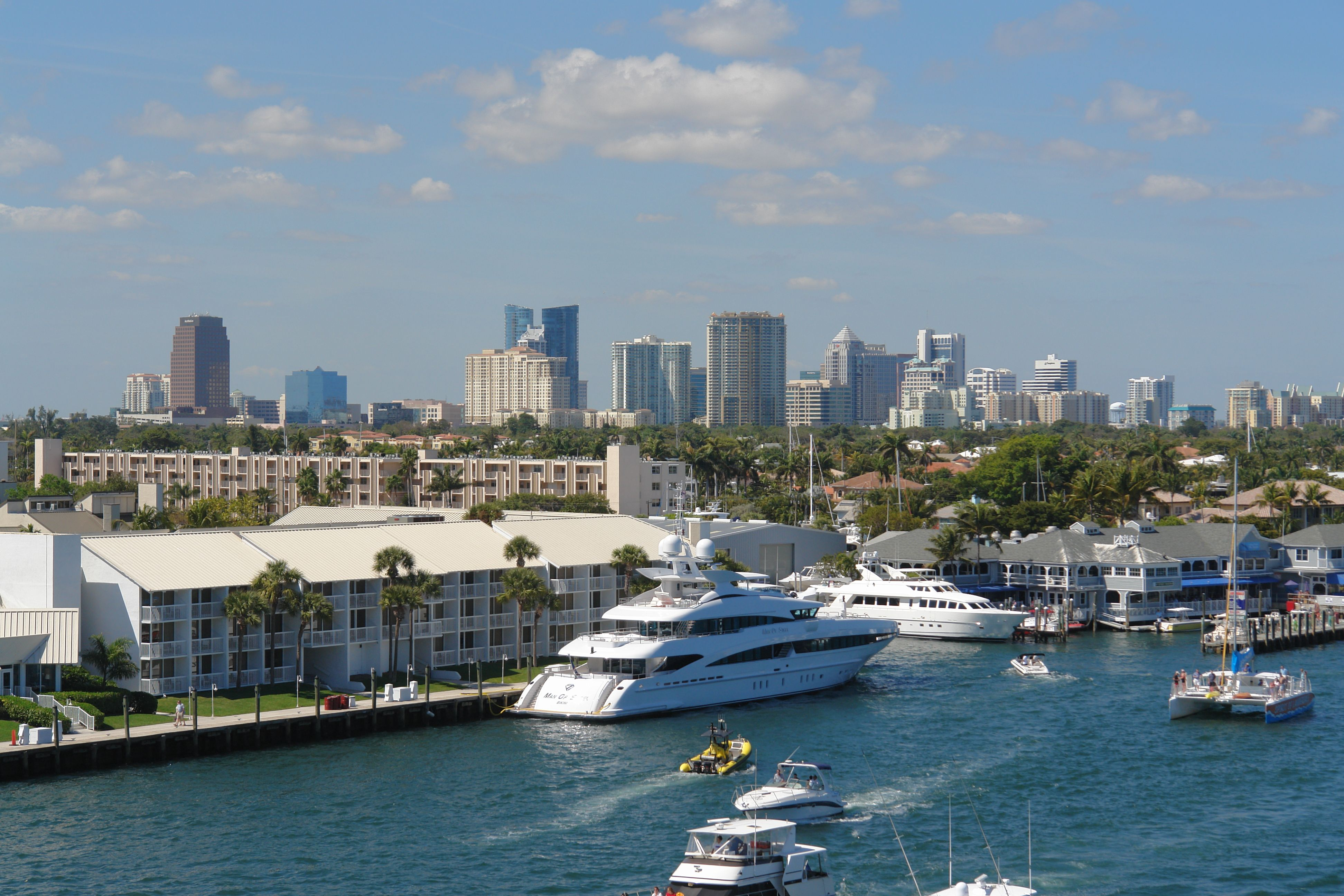 Skyline of Fort Lauderdale